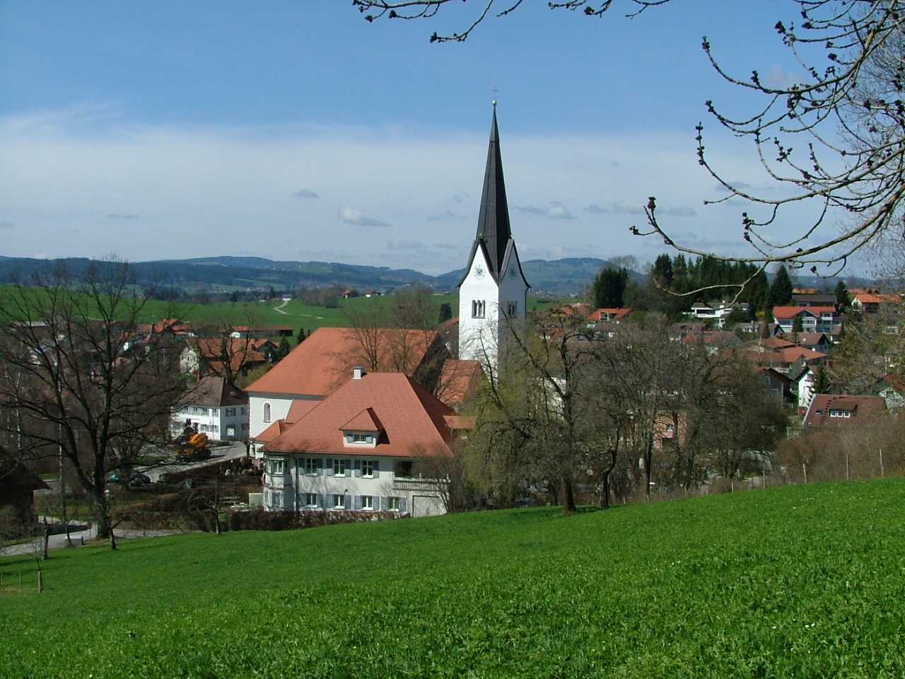 Sulzberg